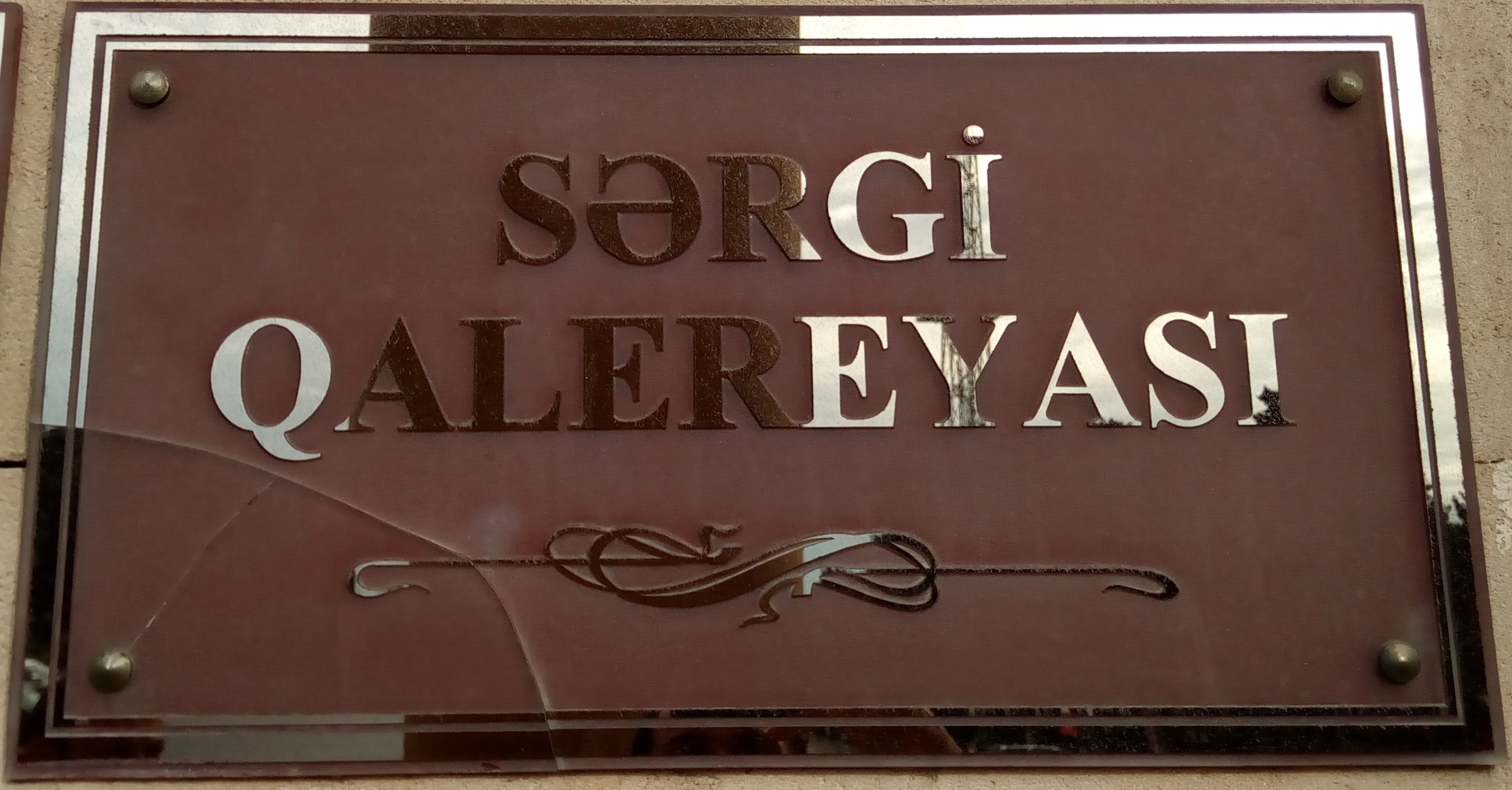 Muzey Mərkəzi